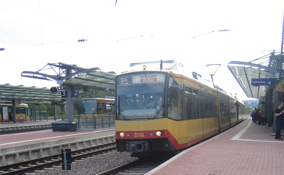 Kraichgaubahn am Bahnhof Bretten